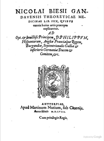 Theoretica Medicina: Libri 6, 1564, Nicolaus Biese (1516-1572)